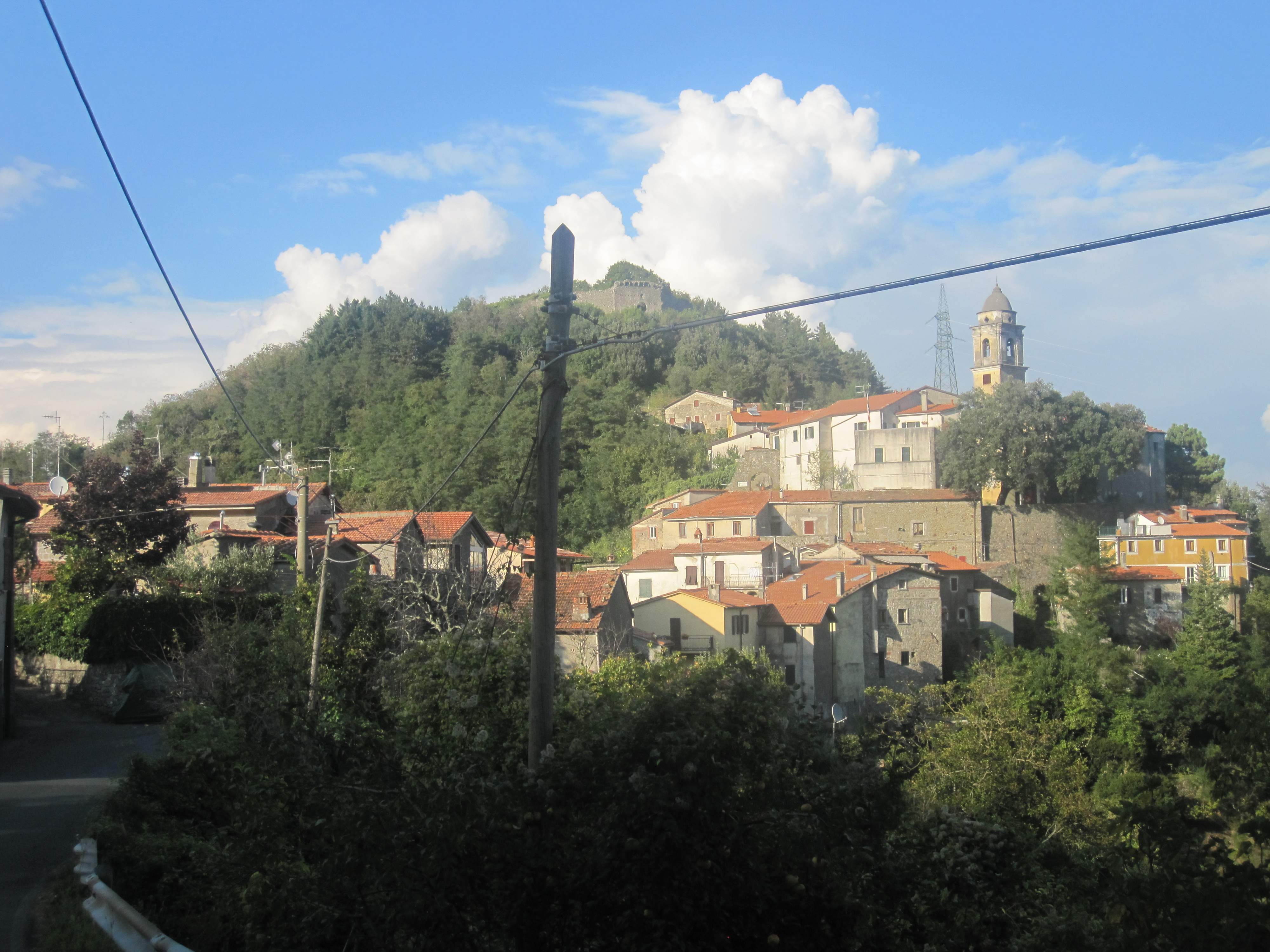 Ponzanello (Opera propria, Matteo Tamburini)